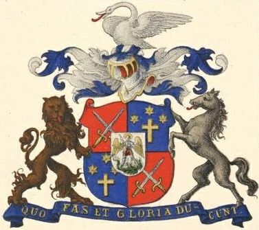 Schuberti suguvõsa aadlivapp